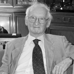 スギライトのパイオニアであるRoyalAzelの創始者であるアイ・カーゲン（1924－2016）